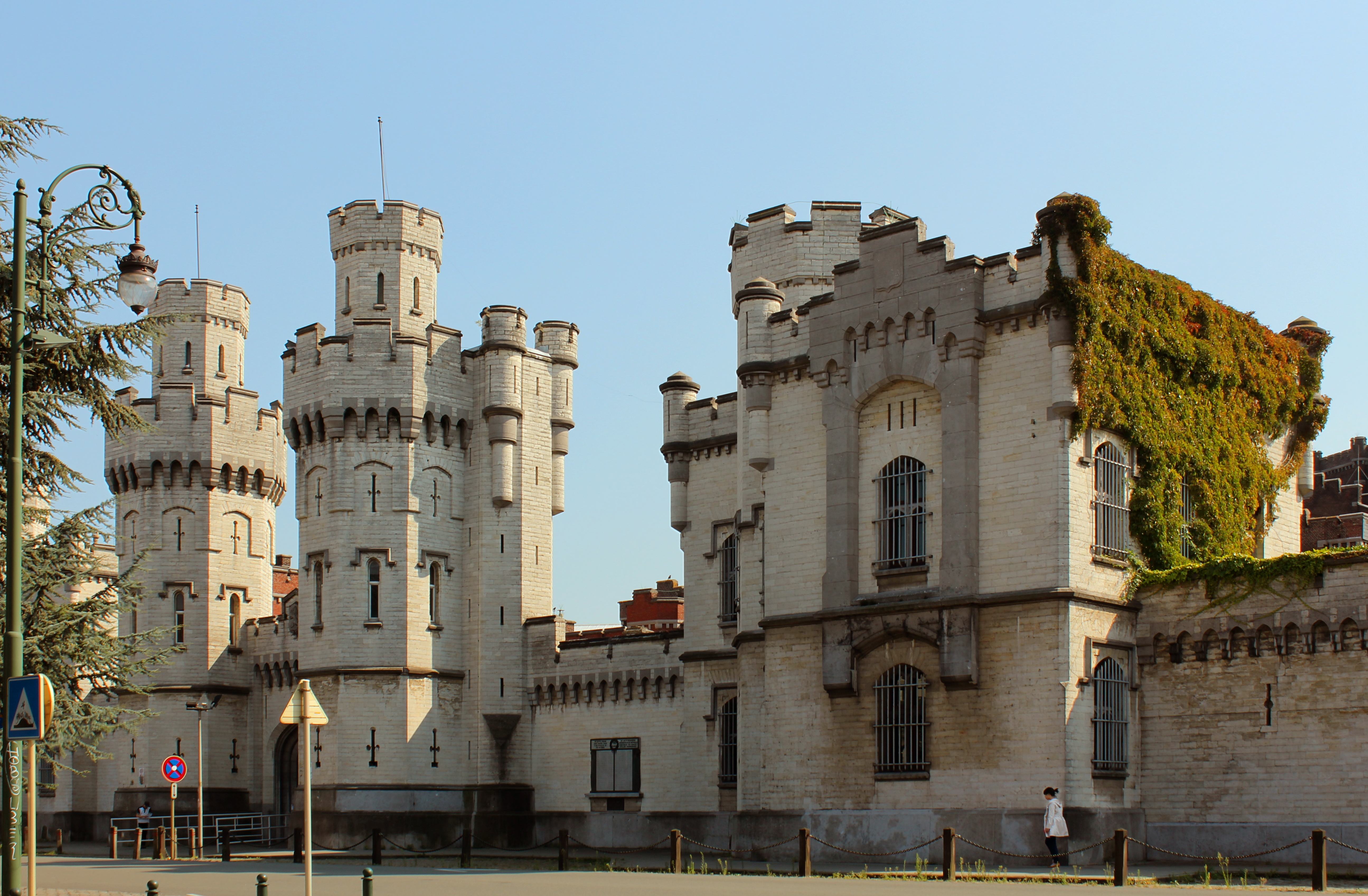 Vue de la façade avant de la prison de Saint-Gilles, Bruxelles, Belgique.